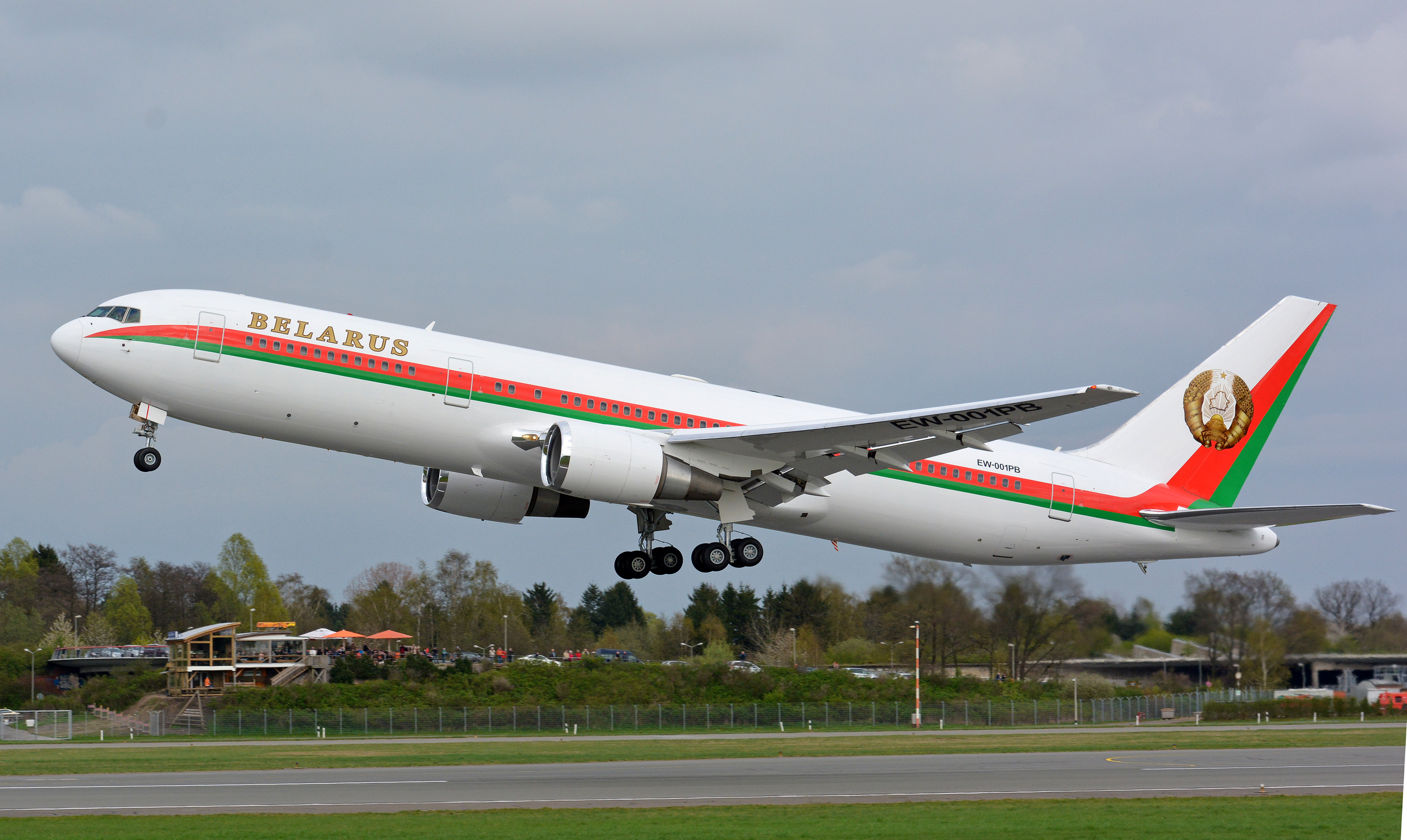 Boeing 767-32K(ER) (EW-001PB) auf dem Hamburg Airport.